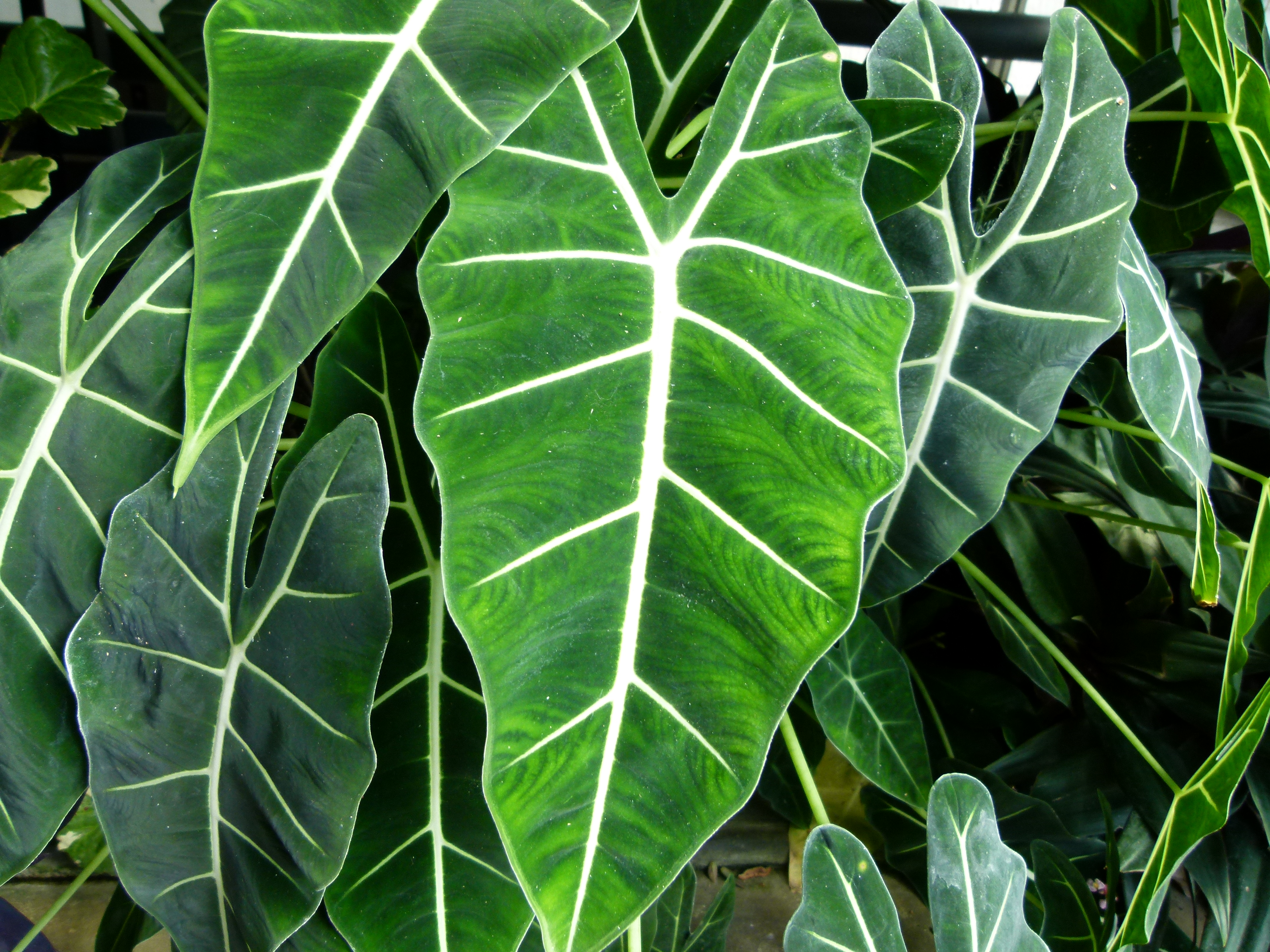 Alocasia micholitziana